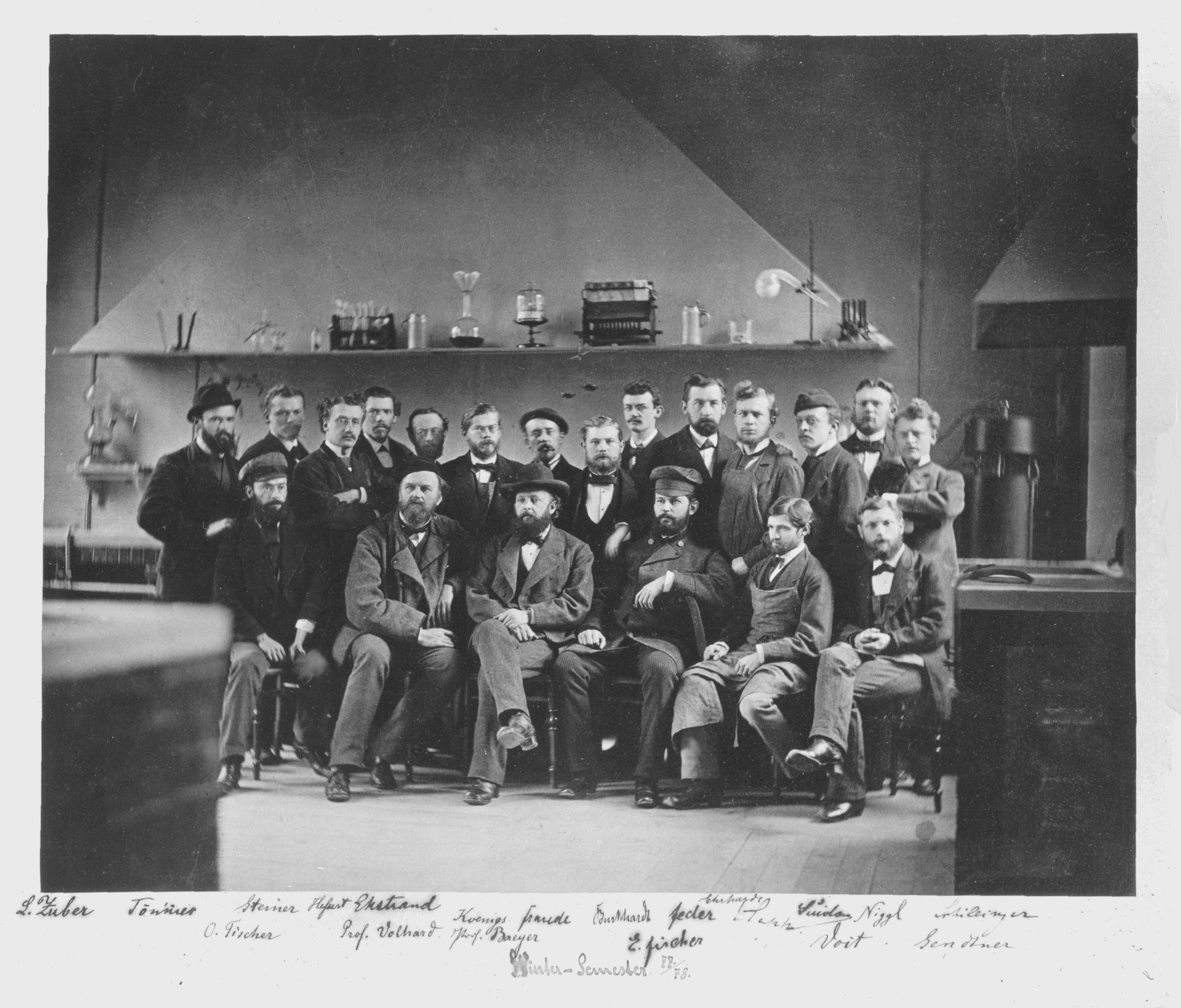 LMU München - Chemie-Professoren und ihre Studenten/Doktoranten Wintersemester 1877/1878 1st row (standing) v.l.n.r. L. Zuber Paul Tönnies (* 18??; † 19??), promoviert 1880 bei Baeyer (München) Antal Steiner (* 1840; † 1905), promoviert 1878 bei Baeyer (München) - from Hungary ?? Dr. Åke Gerhard Ekstrand (* 1846; † 1933), promoviert 1875 (Uppsala); post-doc from Sweden Dr. Wilhelm Koenigs (* 22. April 1851 in Dülken; † 15. Dezember 1906 in München), 1881 Habilitation [1][2] Dr. Georg Christian Fraude (* 2. Februar 1848 in Dölitz; † 19. Februar 1899 in München), post-doc bei Baeyer [3] Johann Baptist Burkhardt (* 18??; † 1920), promoviert 1879 bei Baeyer (München) Dr. Hans von Pechmann (* 1. April 1850 in Nürnberg; † 19. April 1902 in Tübingen), promoviert 1874 bei Limpricht (Greifswald) Feder Dr. Eduard Hepp (* 11. Juni 1851 in Straßburg, † 18. Juni 1917 in Frankfurt/Main), promoviert 1875 bei Baeyer (Straßburg) Dr. Wilhelm Suida (* 1853, † 1922), promoviert 1876 in Budapest, post-doc aus Böhmen Max Niggl Albin Schillinger (* 18??; † 1919) 2nd row (sitting) v.l.n.r. Dr. Otto Fischer (* 28. November 1852 in Euskirchen; † 4. April 1932 in Erlangen), 1878 Habilitation Prof. Jacob Volhard (* 4. Juni 1834 in Darmstadt; † 14. Januar 1910 in Halle/Saale) Prof. Adolf Baeyer (* 31. Oktober 1835 in Berlin; † 20. August 1917 in Starnberg) Dr. Emil Fischer (* 9. Oktober 1852 in Euskirchen; † 15. Juli 1919 in Berlin), 1878 Habilitation Labordiener Veit Dr. Rudolf Sendtner (* 1853; † 1933), promoviert 1877 (Erlangen)